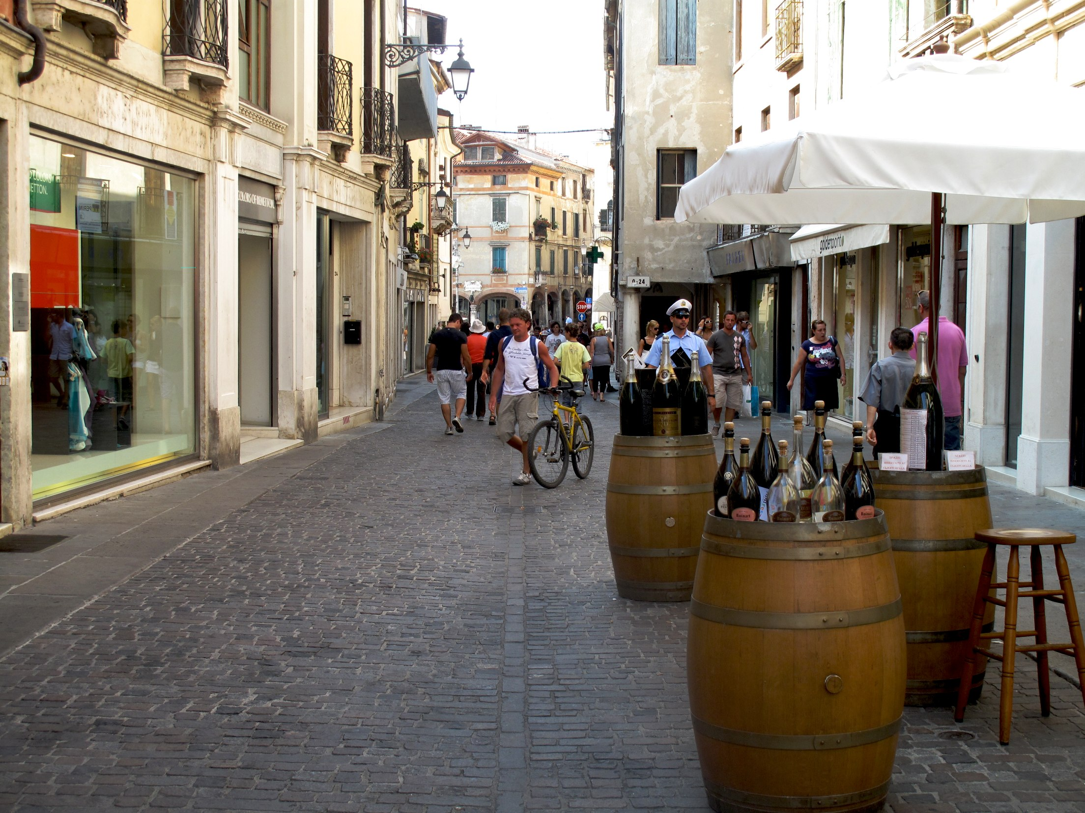 Bassano del Grappa 131